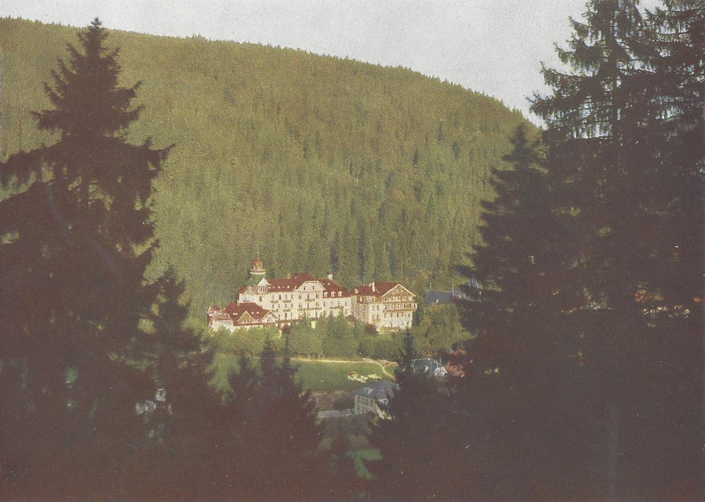 Sanatorium St. Blasien, Ansicht, Aufnahme 1914 aus: Sanatorium St. Blasien Heilanstalt für Lungenkranke, C.A. Wagner Freiburg